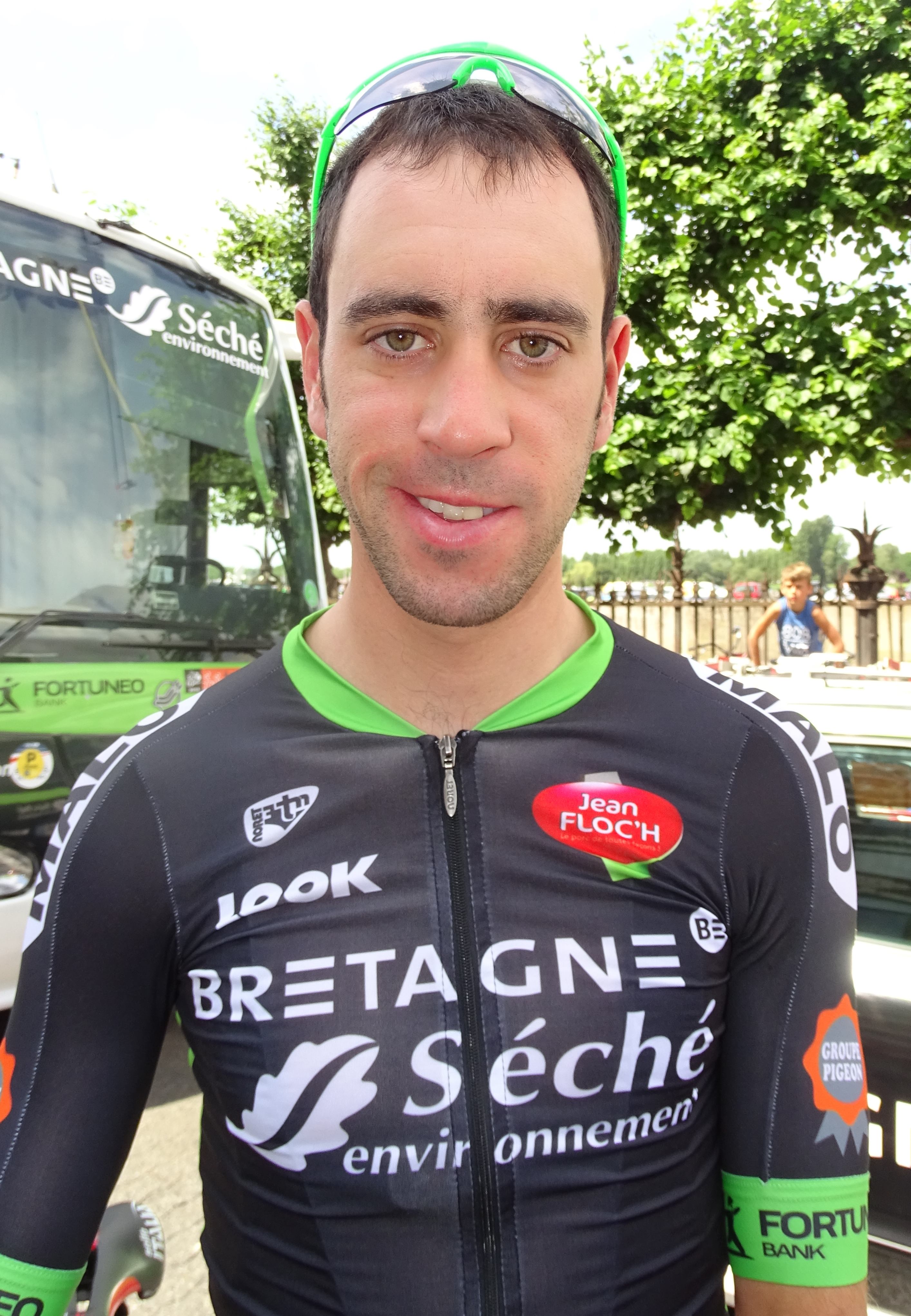 Reportage réalisé le lundi 6 juillet à l'occasion du départ de la troisième étape du Tour de France 2015 à Anvers, Belgique.